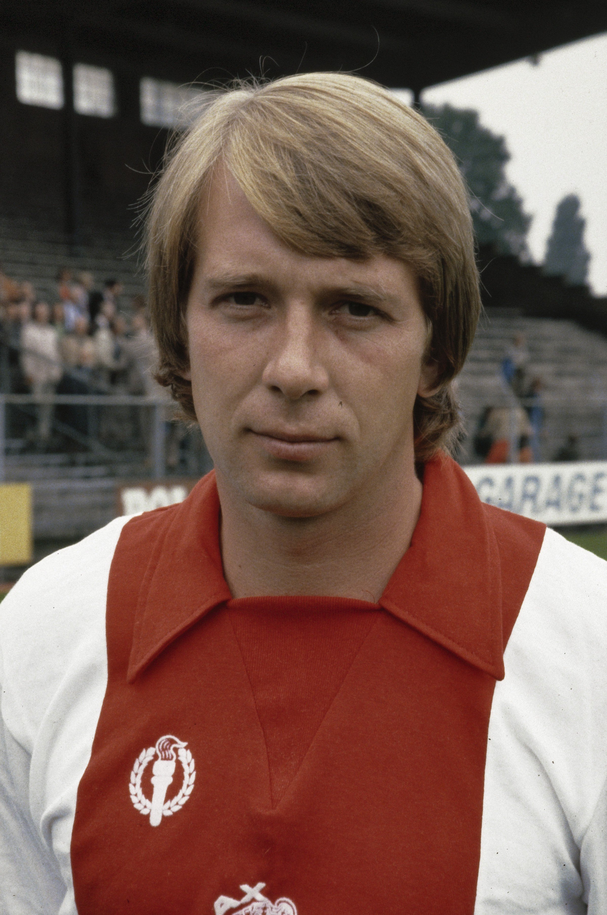 "Presentatie Ajax selectie 1979/1980 ; nr. 18 , 19: Jenzen, nr. 20 : Arnesenpen"